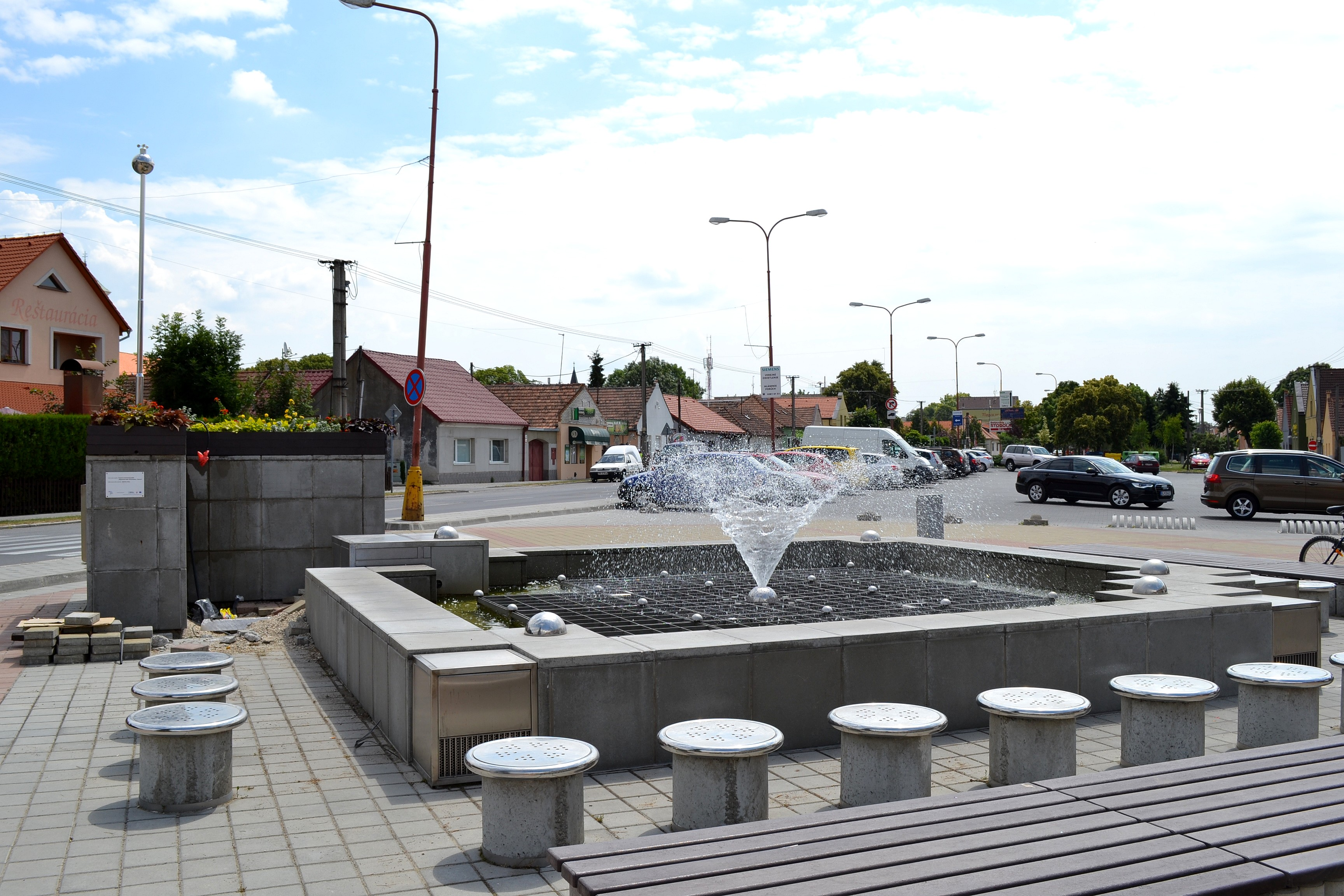 Centrum Rusoviec s fontánou